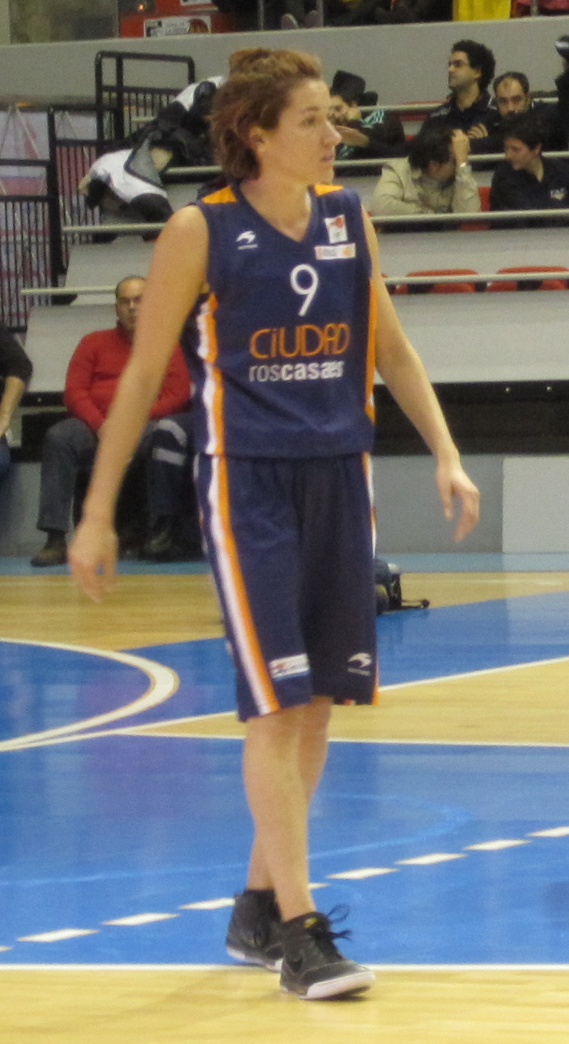 La jugadora de baloncesto española Laia Palau.